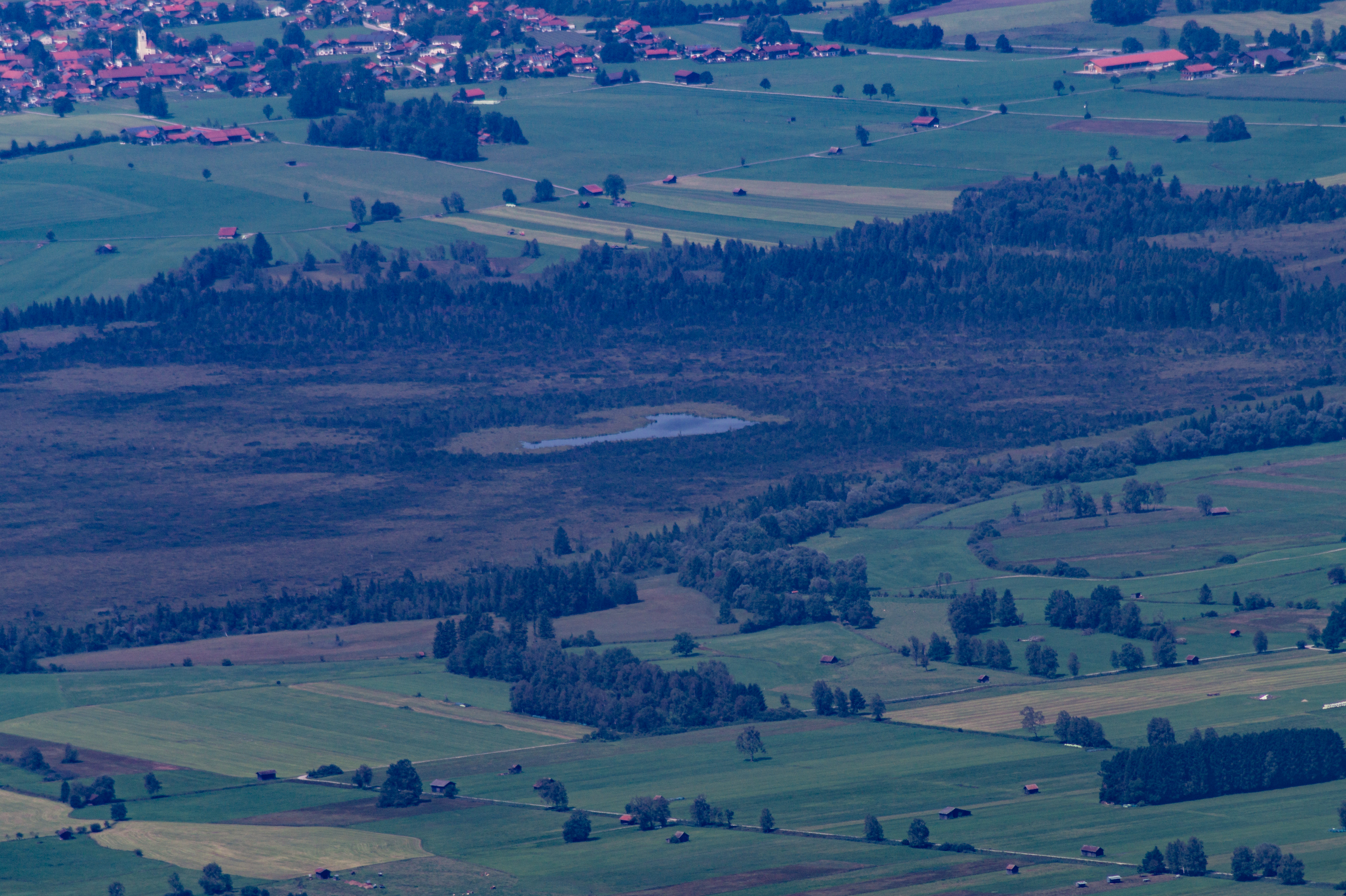 Blick von der Benediktenwand auf den Fichtsee im Sindelsbachfilz